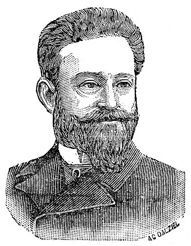 "Arton".